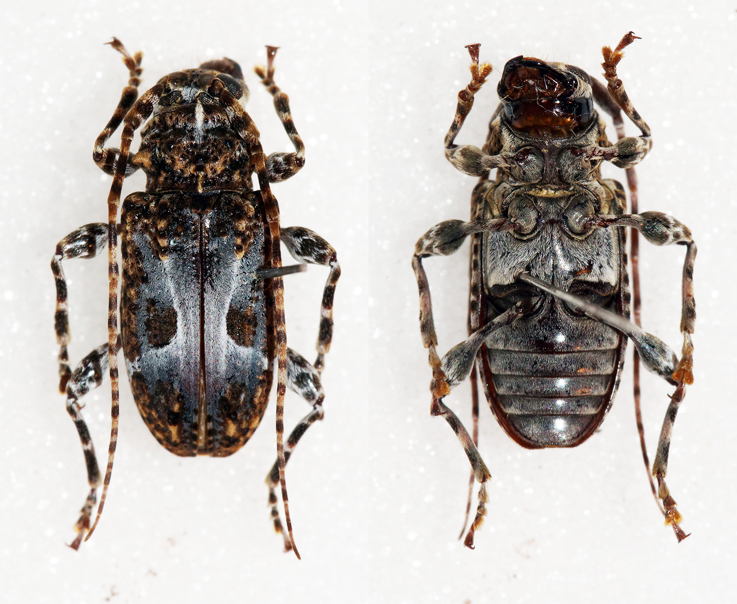 Aurivillius,1921 Sex: Male Data: 09-2012 - Rio Venado - Satipo - Junin - Peru Size: 10mm